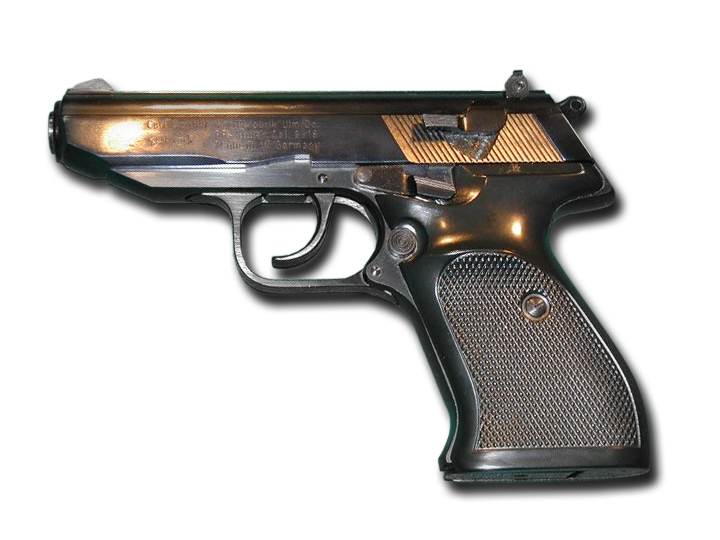 Walther PP Super parabellum (neue Version: gedreht und auf neutralen weißen Hintergrund gesetzt)